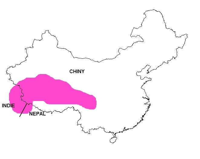 Parus humilis (syn. Pseudopodoces humilis) distribution